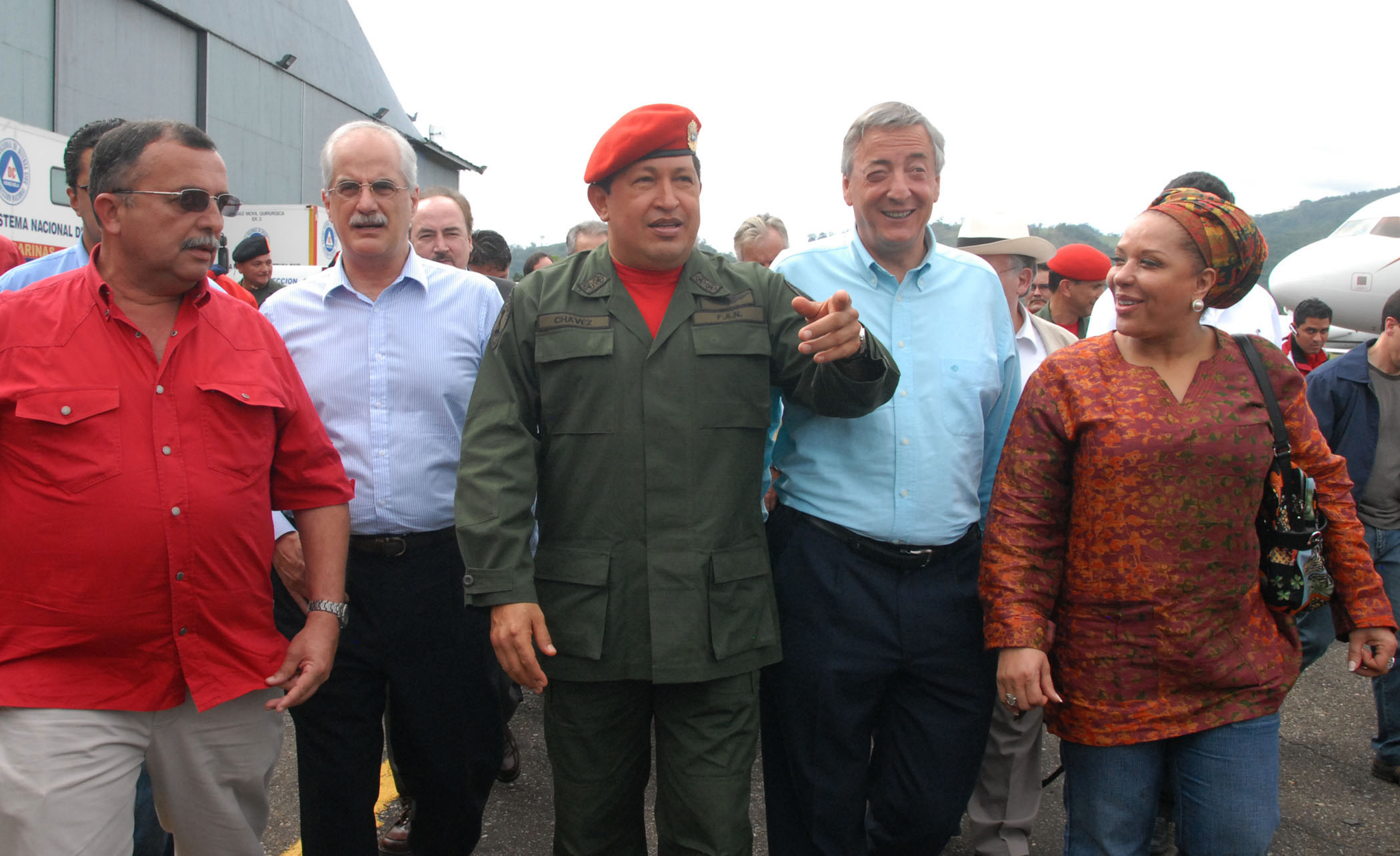 Hugo Chávez junto a los garantes de la "Operación Emmmanuel